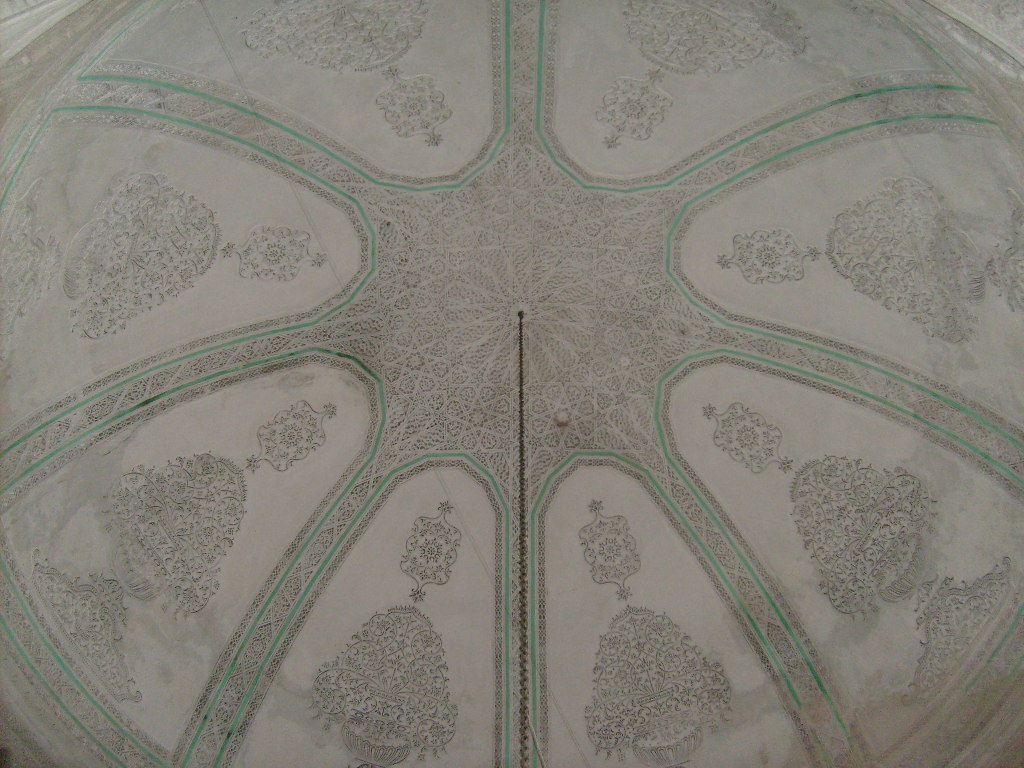 Détail d'une coupole du Tourbet El Bey (Tunis) avec ses motifs en stuc et ses lignes de couleur verte (symbole du paradis)